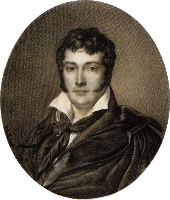 Porträt Charles Louis Fleury Panckoucke (1780 - 1844)